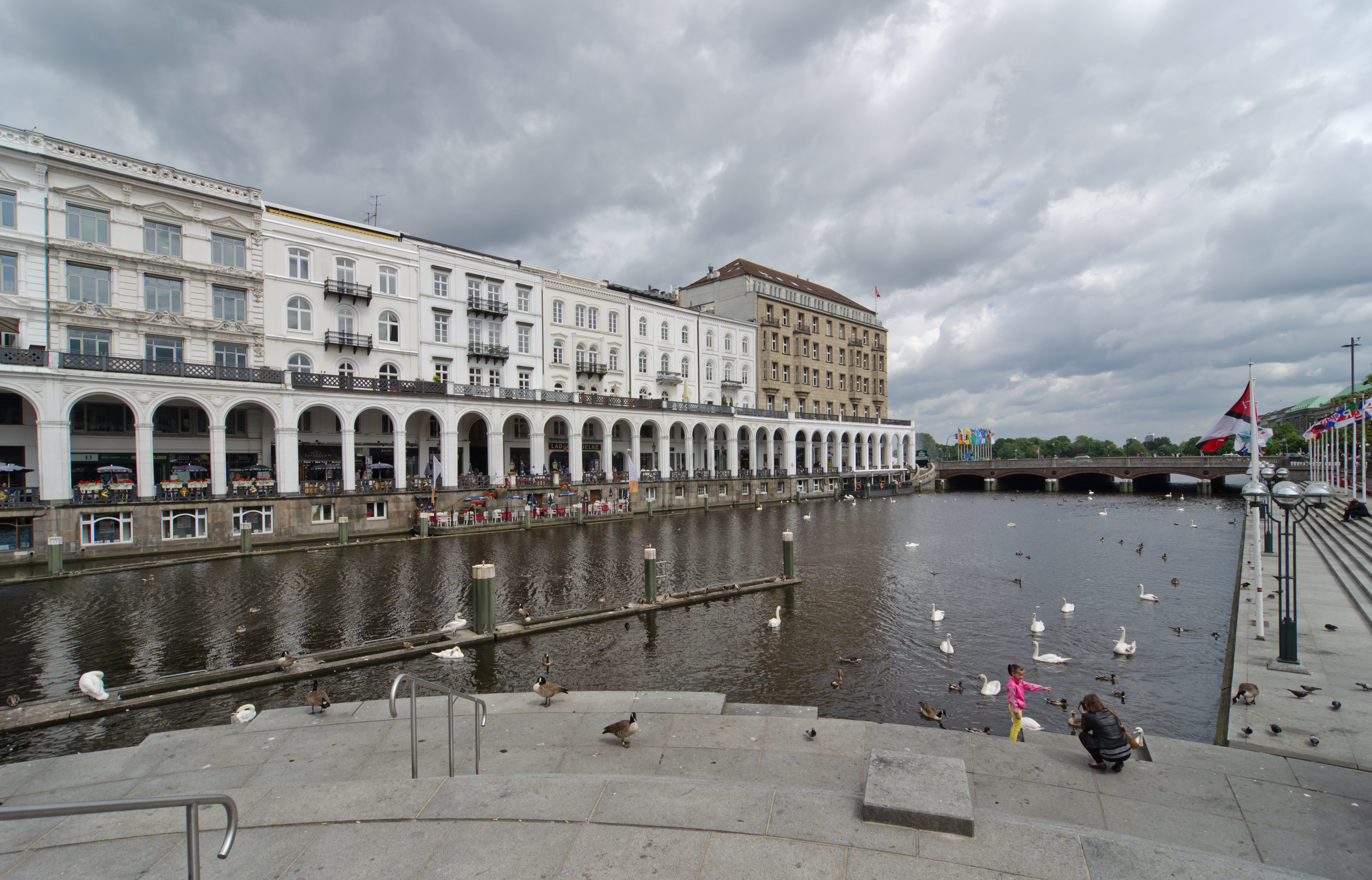 Hamburg Alsterarkaden mit der kleinen Alster